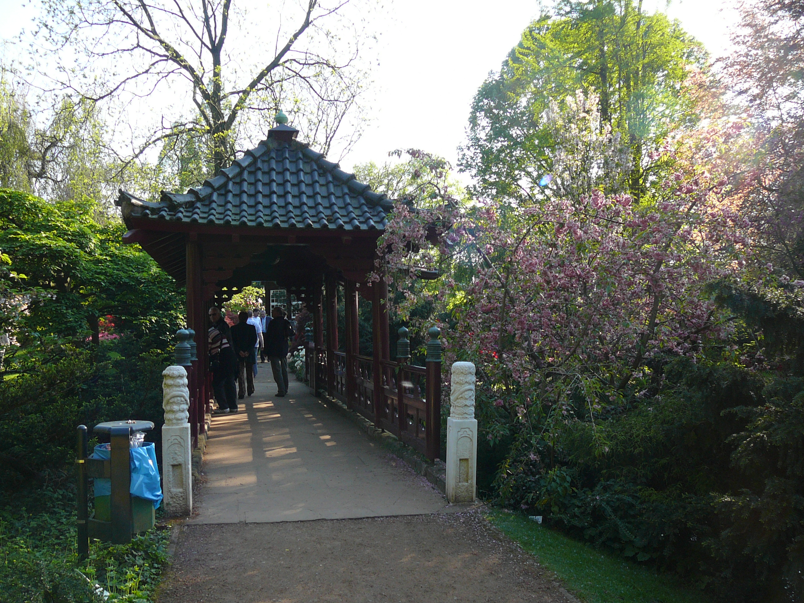 Carl-Duisberg-Park, Kaiser-Wilhelm-Allee, Leverkusen